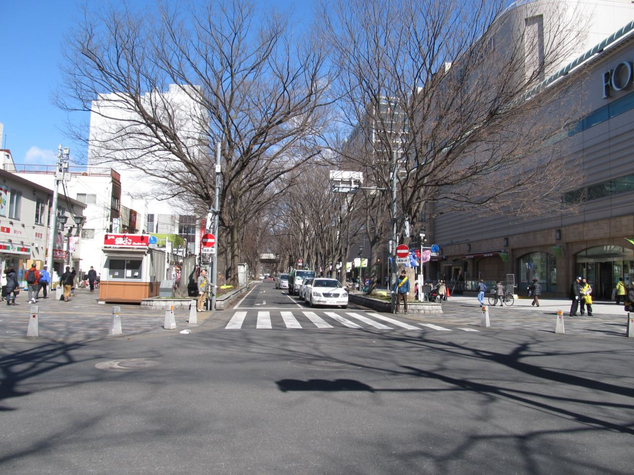 ケヤキ並木通り南端